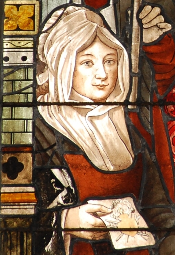 Victoire de Saint-Luc et l’image du Sacré-Cœur, dans l’église Saint-Mathieu de Quimper (transept nord, vitrail intitulé Apparition du Sacré-Cœur, Atelier Champigneulle, Paris, 1896)